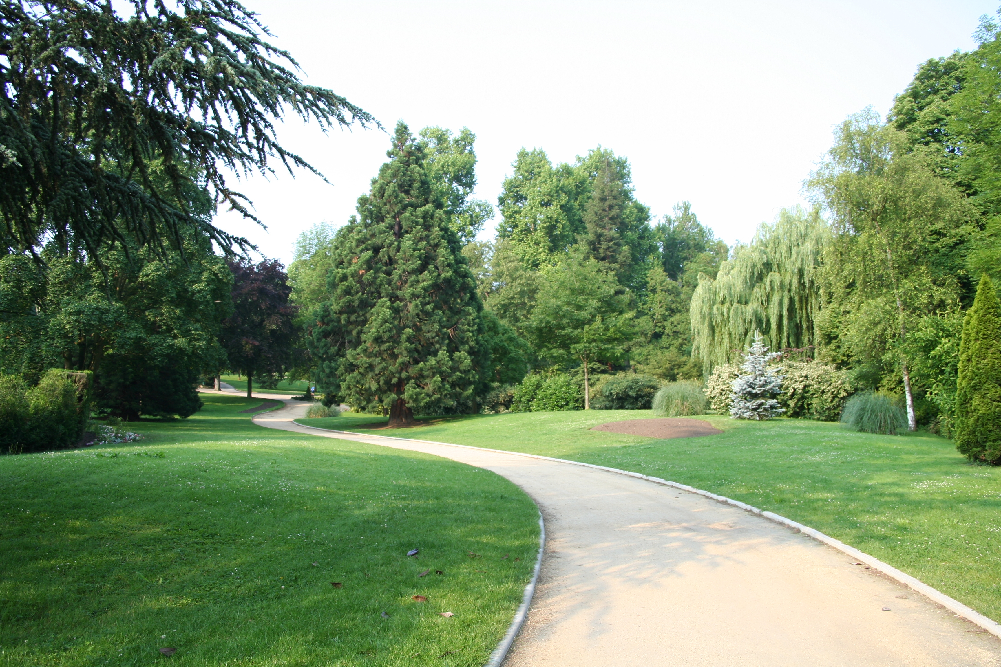 Parc Meissonier à Poissy - Yvelines (France)